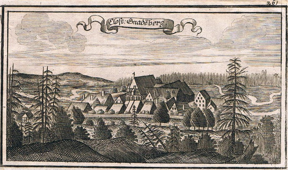 Kloster Gnadenberg bei Berg, Landkreis Neumarkt in der Oberpfalz